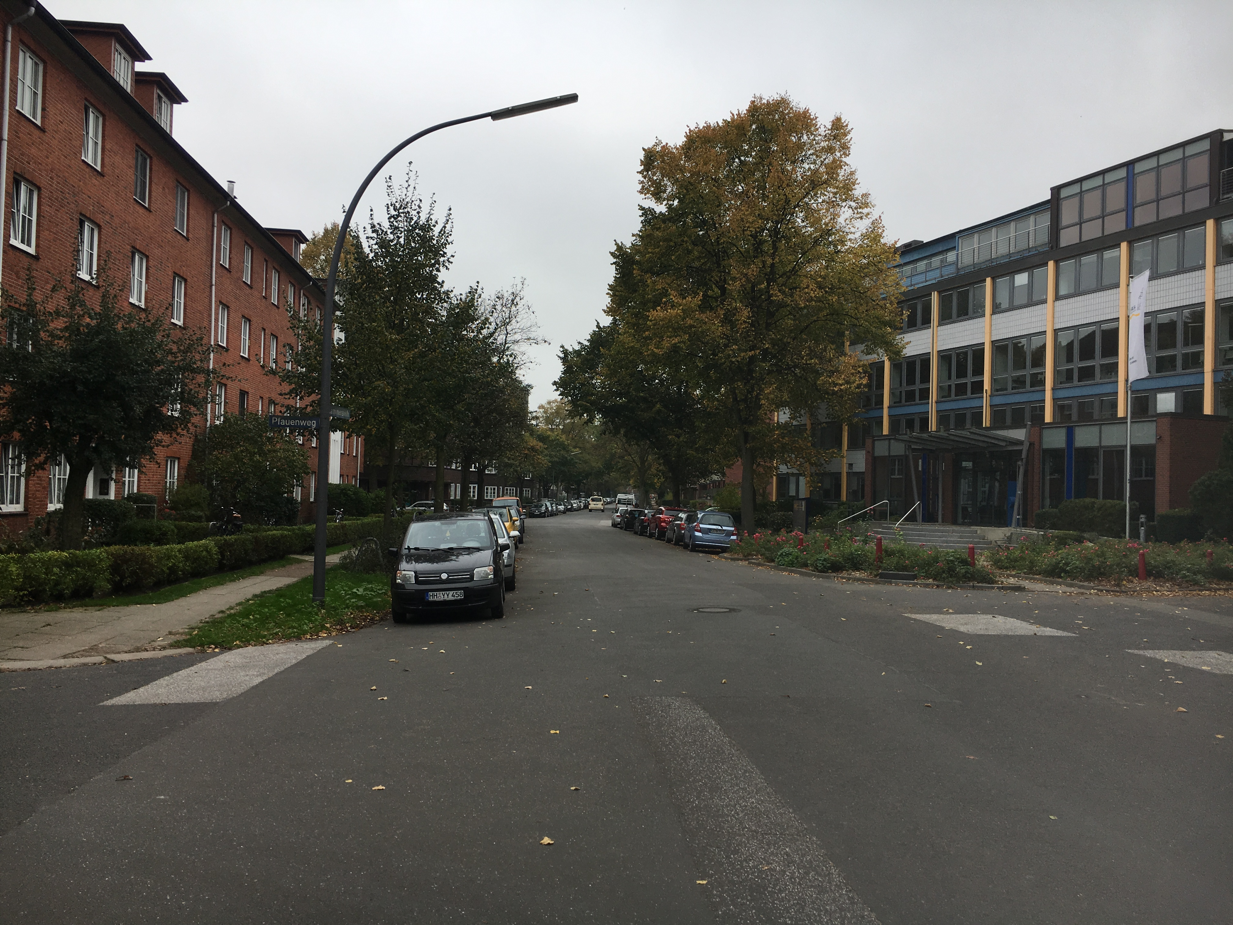 Lämmersieth, Blick von der Kreuzung Pfauenweg zur Krausestraße, rechts die Geschäftsstelle der HANSA Baugenossenschaft